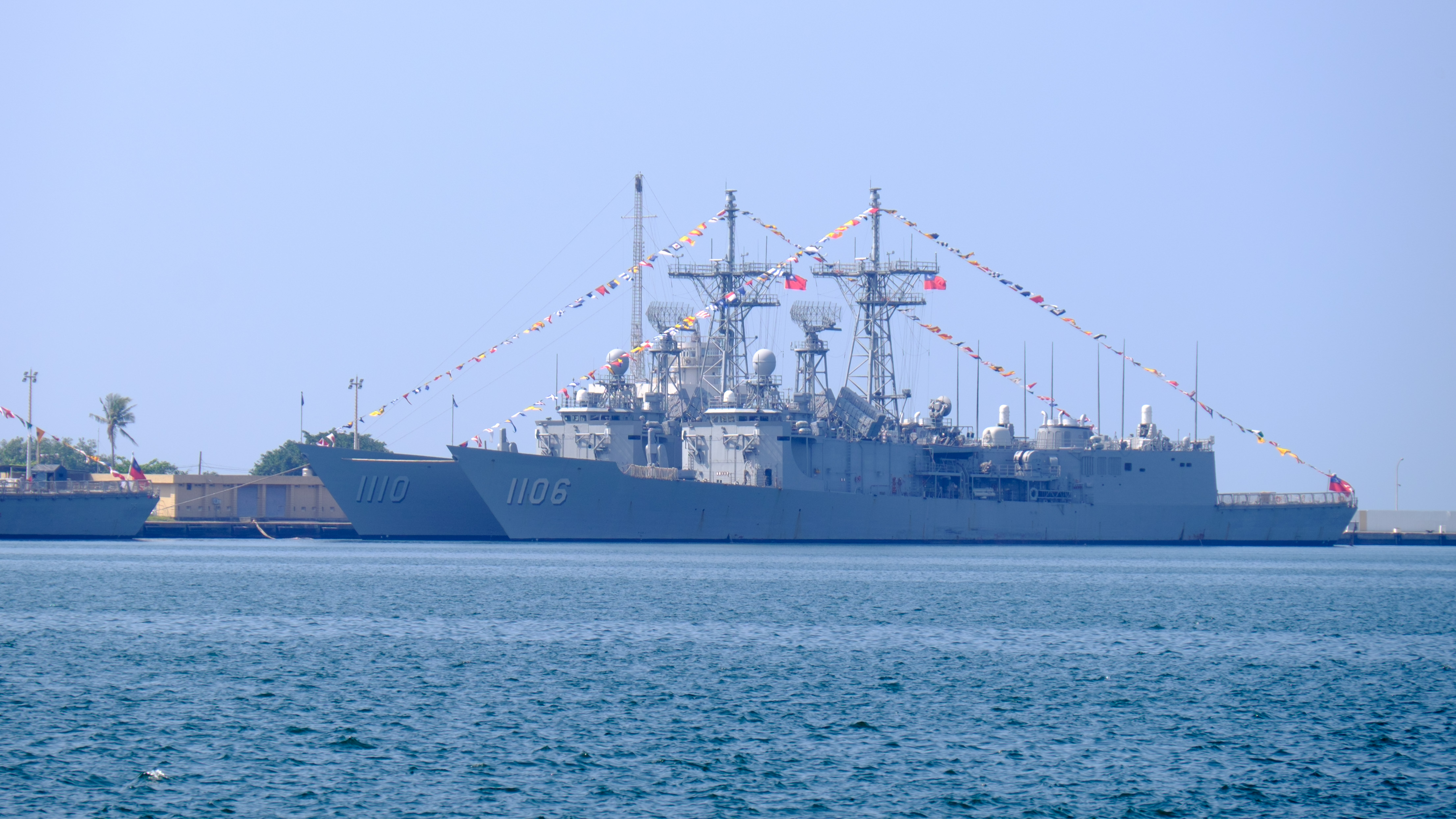 中華民國海軍停泊左營軍港的岳飛軍艦（PFG2-1106）與田單軍艦（PFG2-1110），攝於2015年營區開放活動。